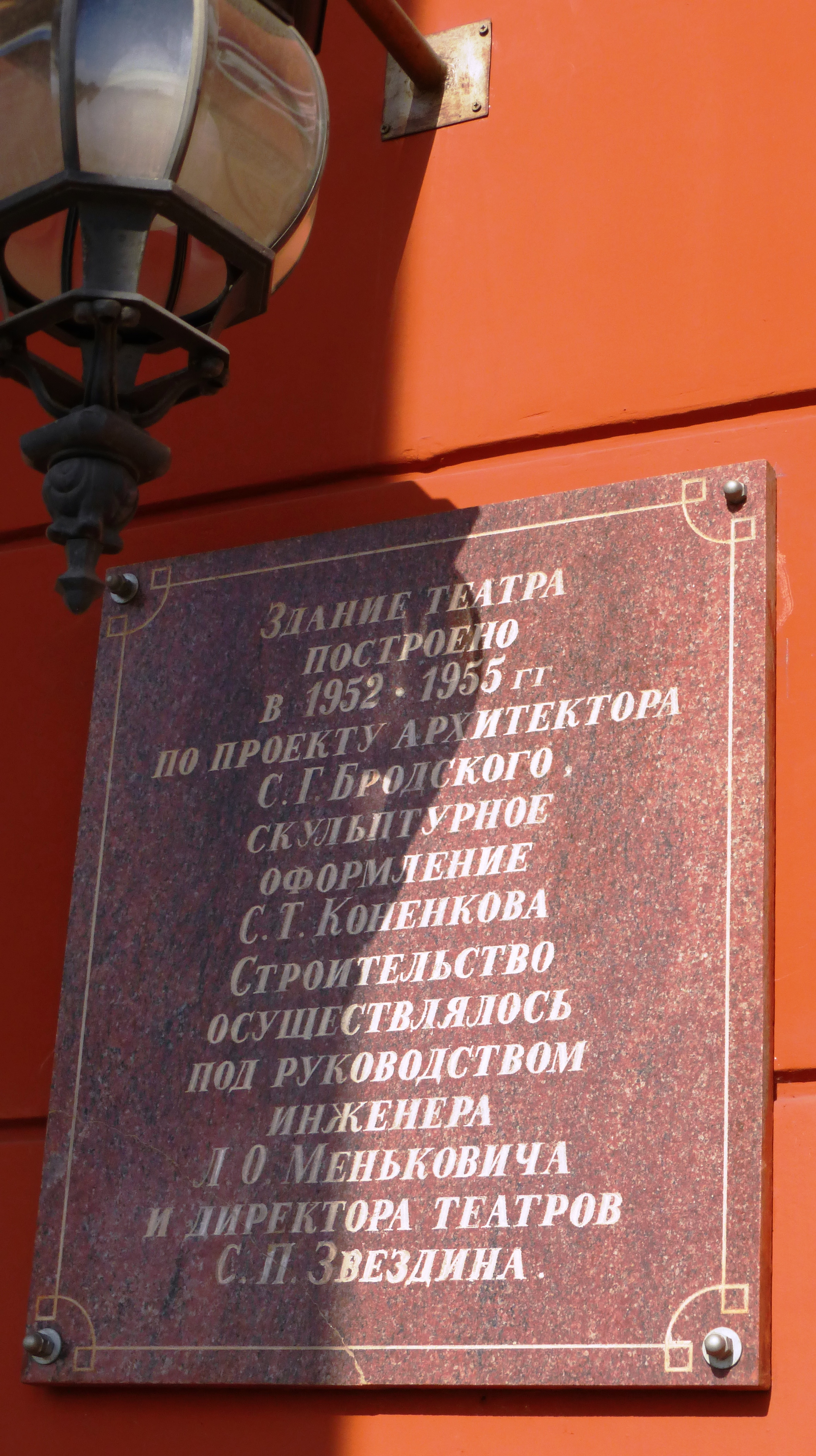 Памятная доска на здании Драмтеатра в Петрозаводске на пл.Кирова.